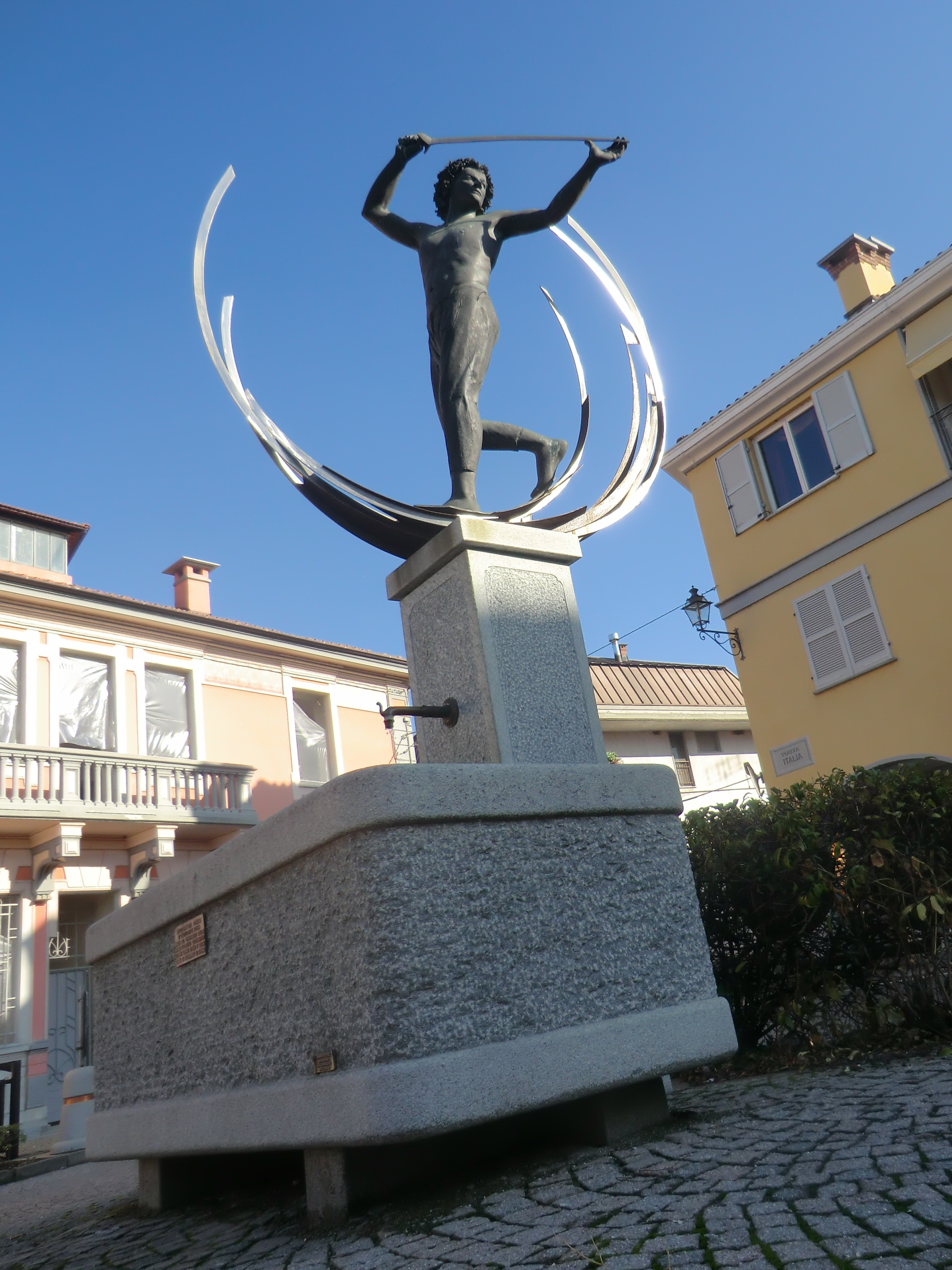 Castelletto Stura (Cuneo): statua il "bal del sabre" (ballo delle spade) - Elio Garis (2000)